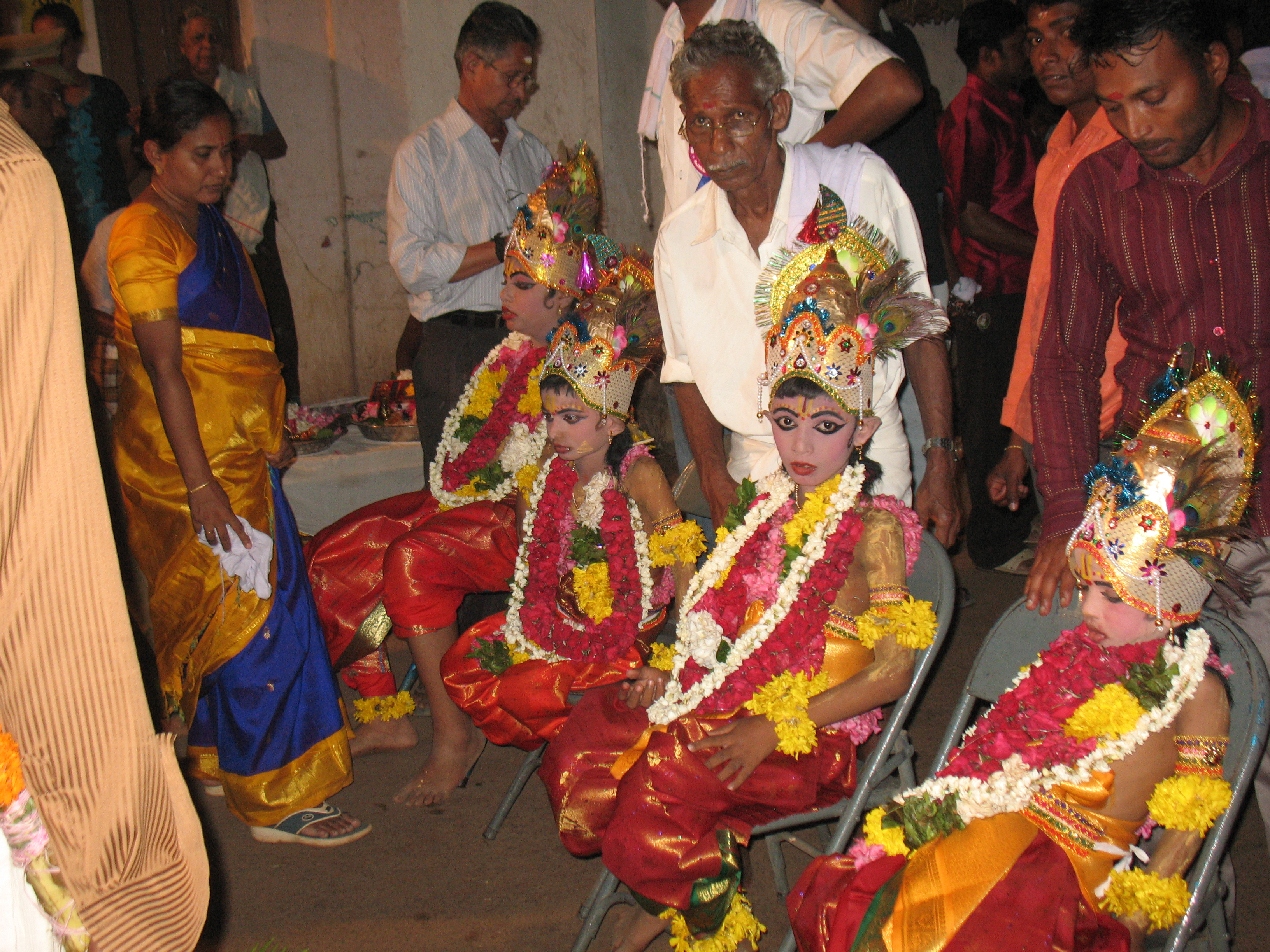 ആറ്റുകാലിലെ കുത്തിയോട്ട ബാലന്മാർ